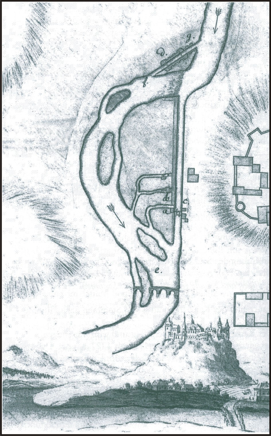 Landgraf-Carl-Kanal - Ursprungsplan der Wasserführung in Trendelburg Quelle: Handschriftenabteilung Landesmuseum Kassel Zeichner: Oberst Christoph Münnich Datum: 1713 Sonstiges: Ausschnitt-Repro presse03 Legende a+b = Mühlen rechts davon = Mühlengraben, Grabenmauer c = landgräfliche Mühle D = Schachtschleuse e = steinerne Bogenbrücke f = bergseitige Schleuseneinfahrt g = talseitige Schleuseneinfahrt rechts von f = Mühlengrabenwehr rechts von g = Mühlenwehr